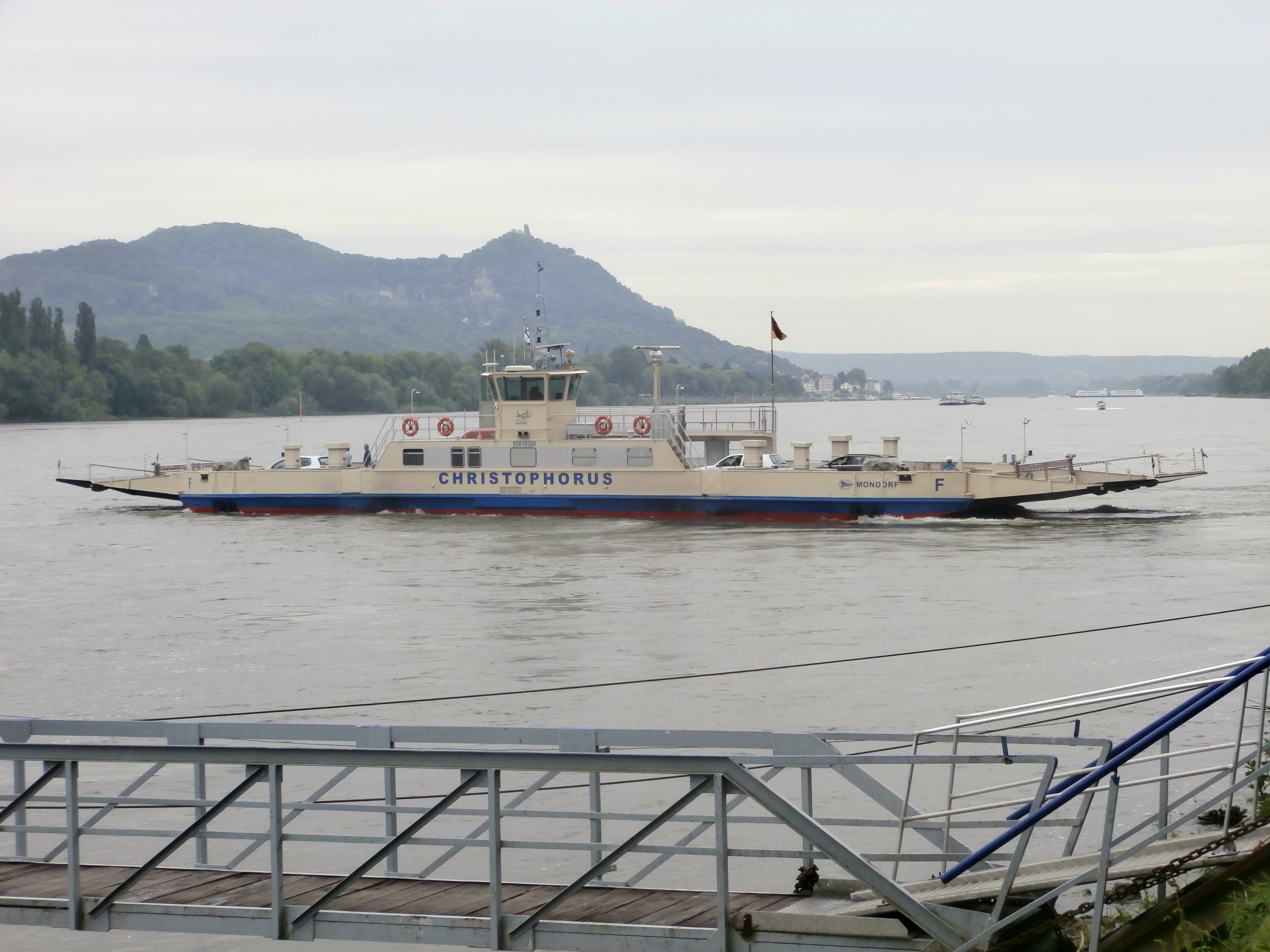 Fährschiff Christophorus der Rheinfähre Bad Godesberg–Niederdollendorf: Ansicht vom Von-Sandt-Ufer, Bonn-Plittersdorf